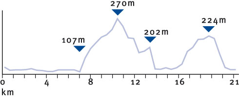 Höhenprofil des SAS Halbmarathons der TSG 78 Heidelberg